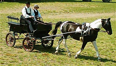 Wagonette, Einspänner auf der der Pferd International